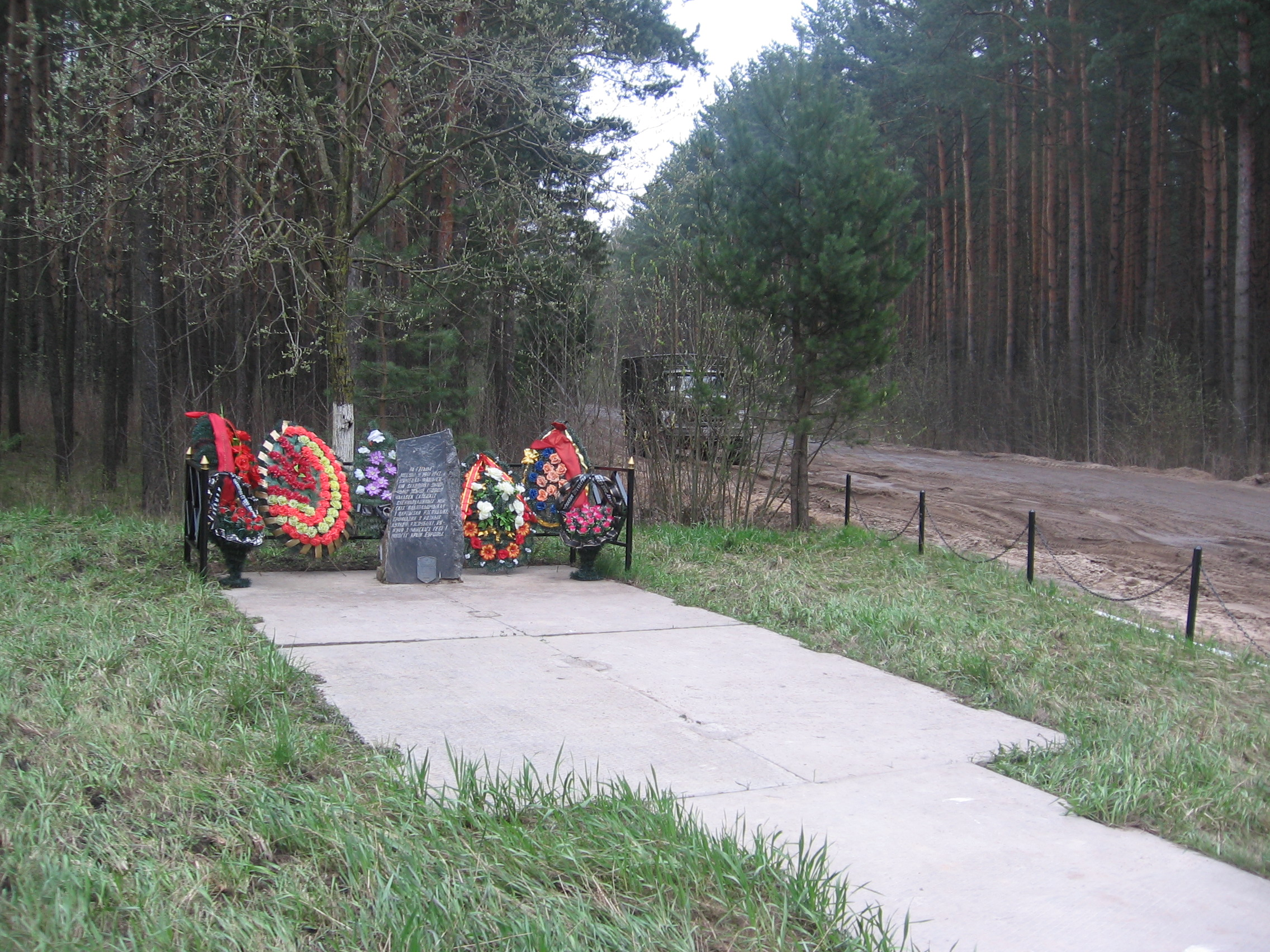 Беларуская (тарашкевіца): Тэрыторыя былога лягера сьмерці «Трасьцянец». г. Менск This is a photo of Belarusian heritage monument. Reference number: 713Д000283 ( WLM)